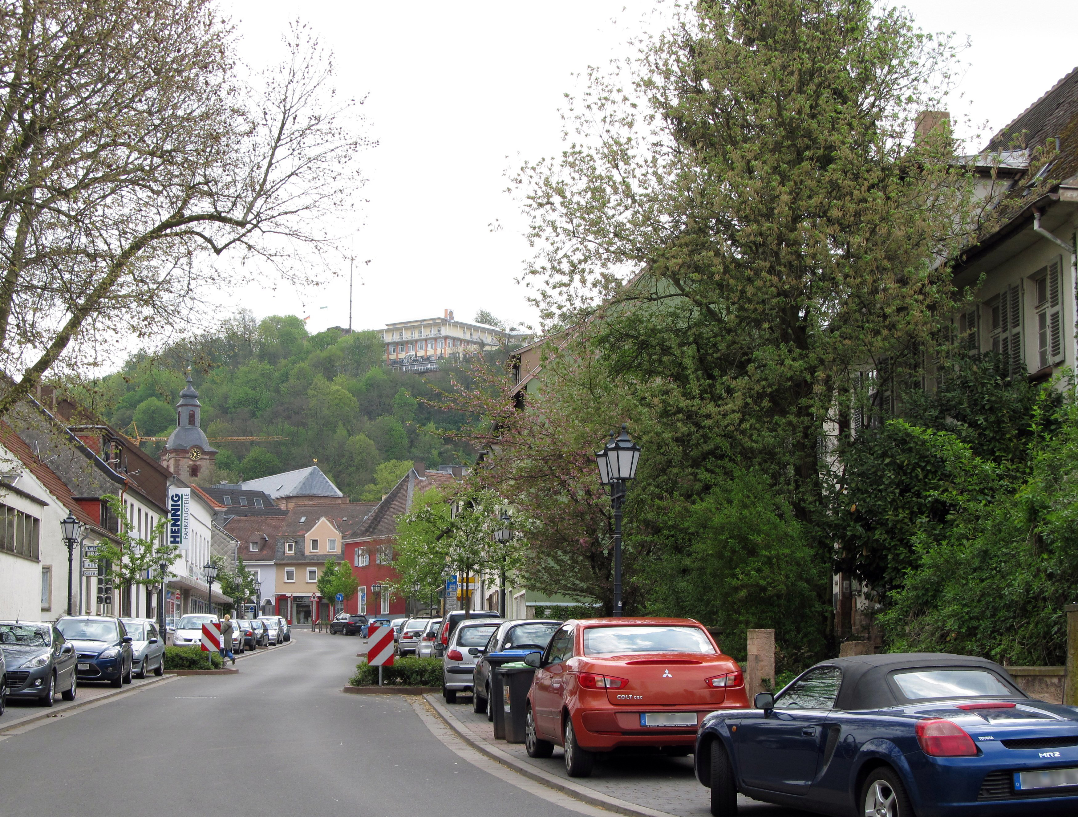 Homburg/Saar, Blick in die Saarbrücker Straße